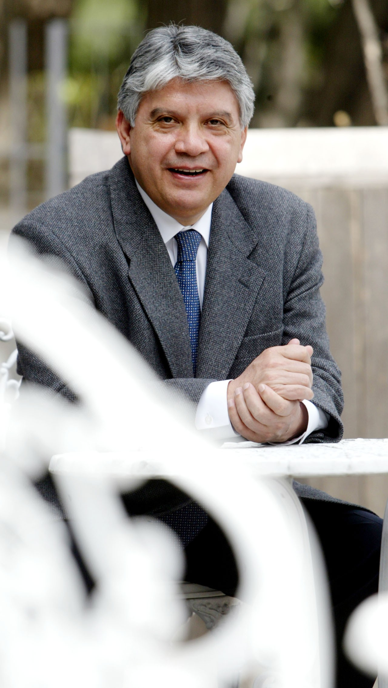 El escritor y diplomático mexicano